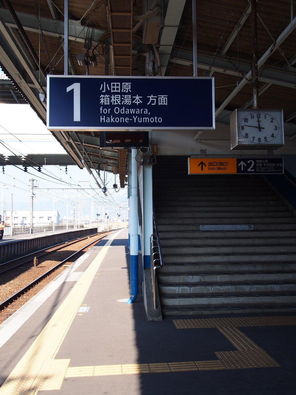 1番ホームから新松田方を見る（2014年12月）